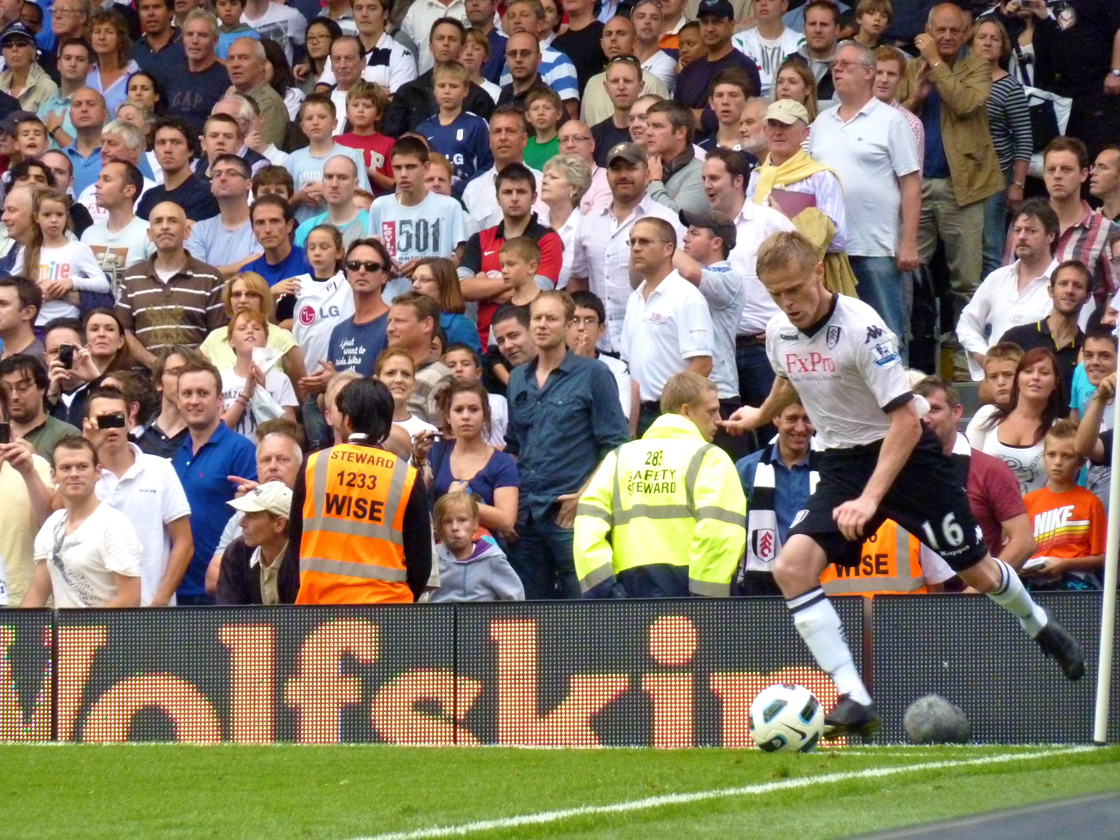 Damien Duff of Fulham F.C.